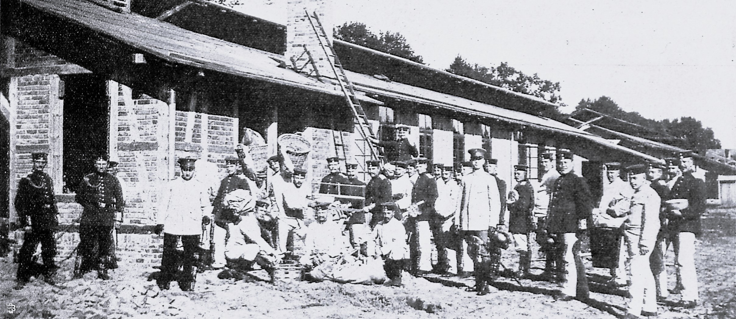 Das Barackenlager auf dem Burgfelde. Das Personal kurz vor der Eröffnung.